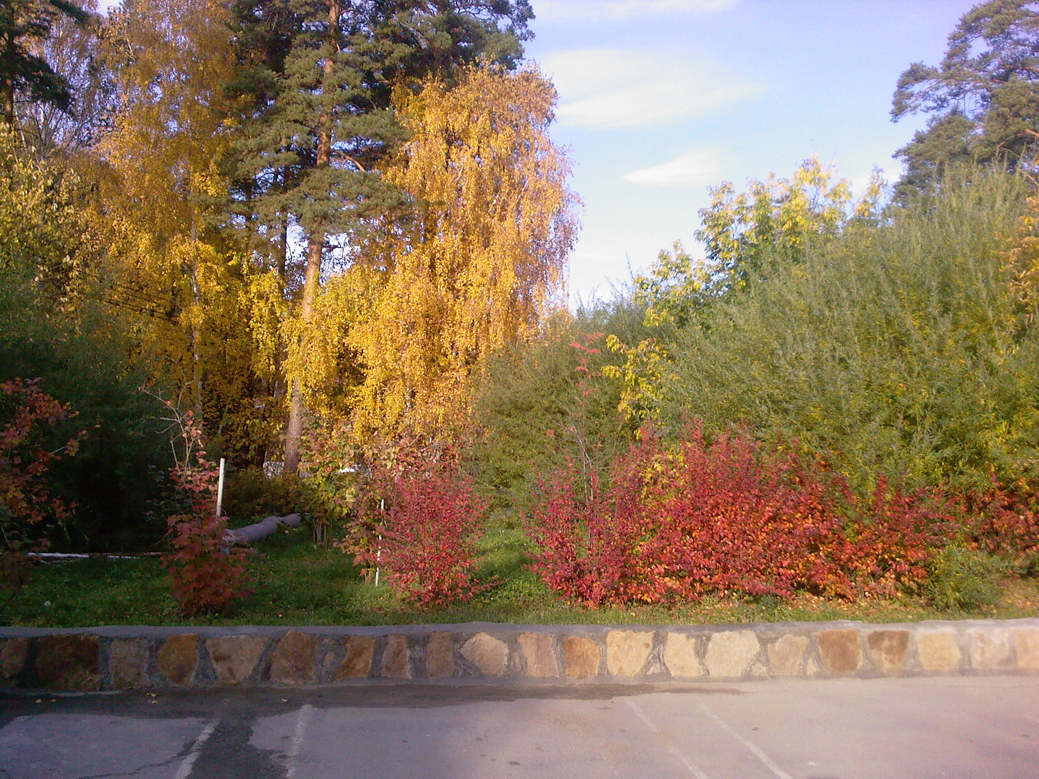 Санаторий Увильды